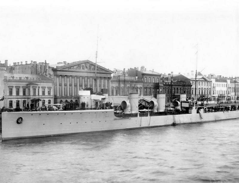 Миноносец «Охотник», командир капитан 1 ранга барон Гревениц. Пришвартован у Английской набережной, напротив особняка княгини Дарьи Евгеньевны Кочубей